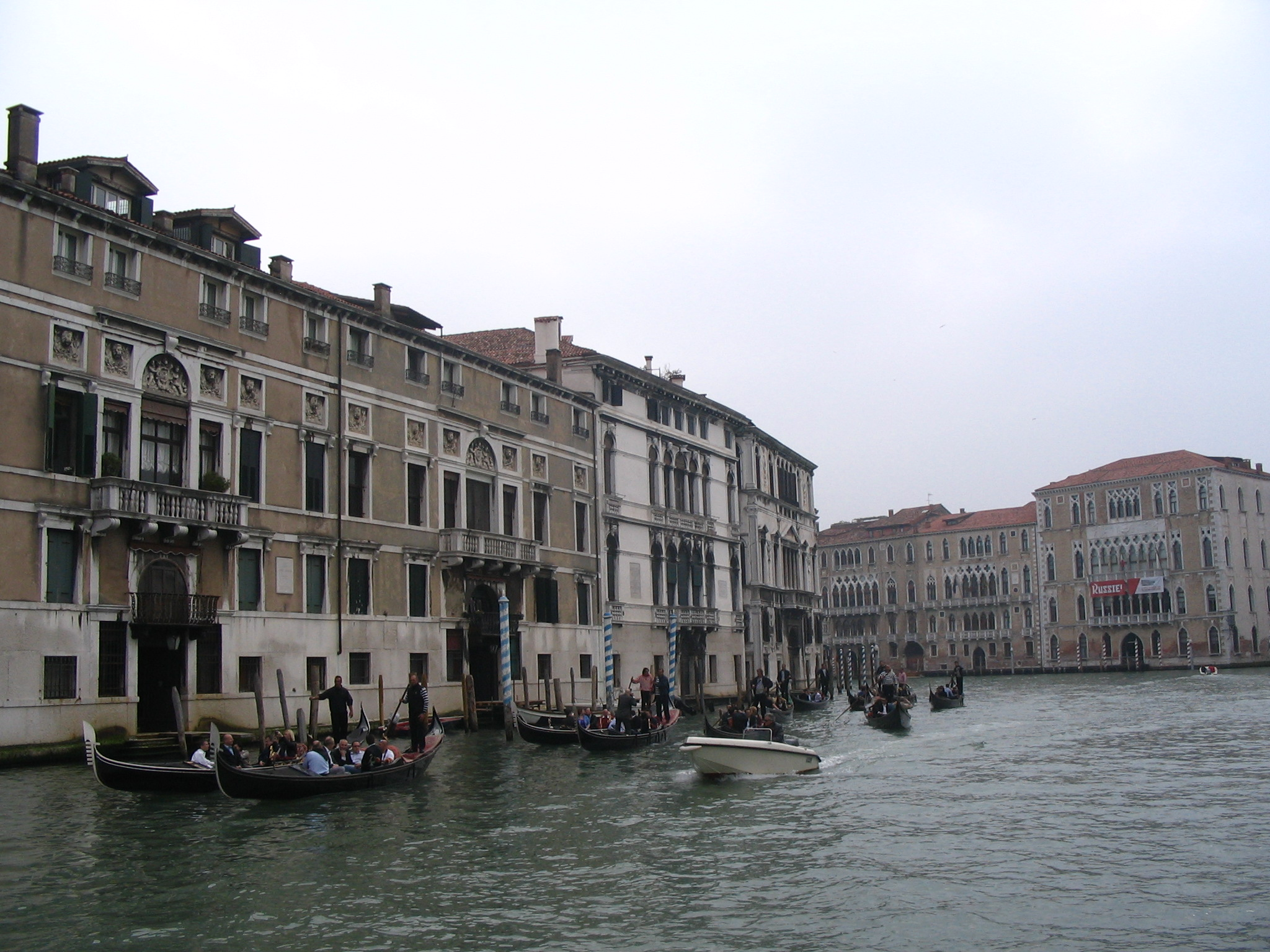 Palais Mocenigo - Grand Canal - Venise Italie